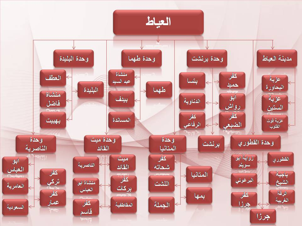 الهيكل الاداري لمدينة العياط